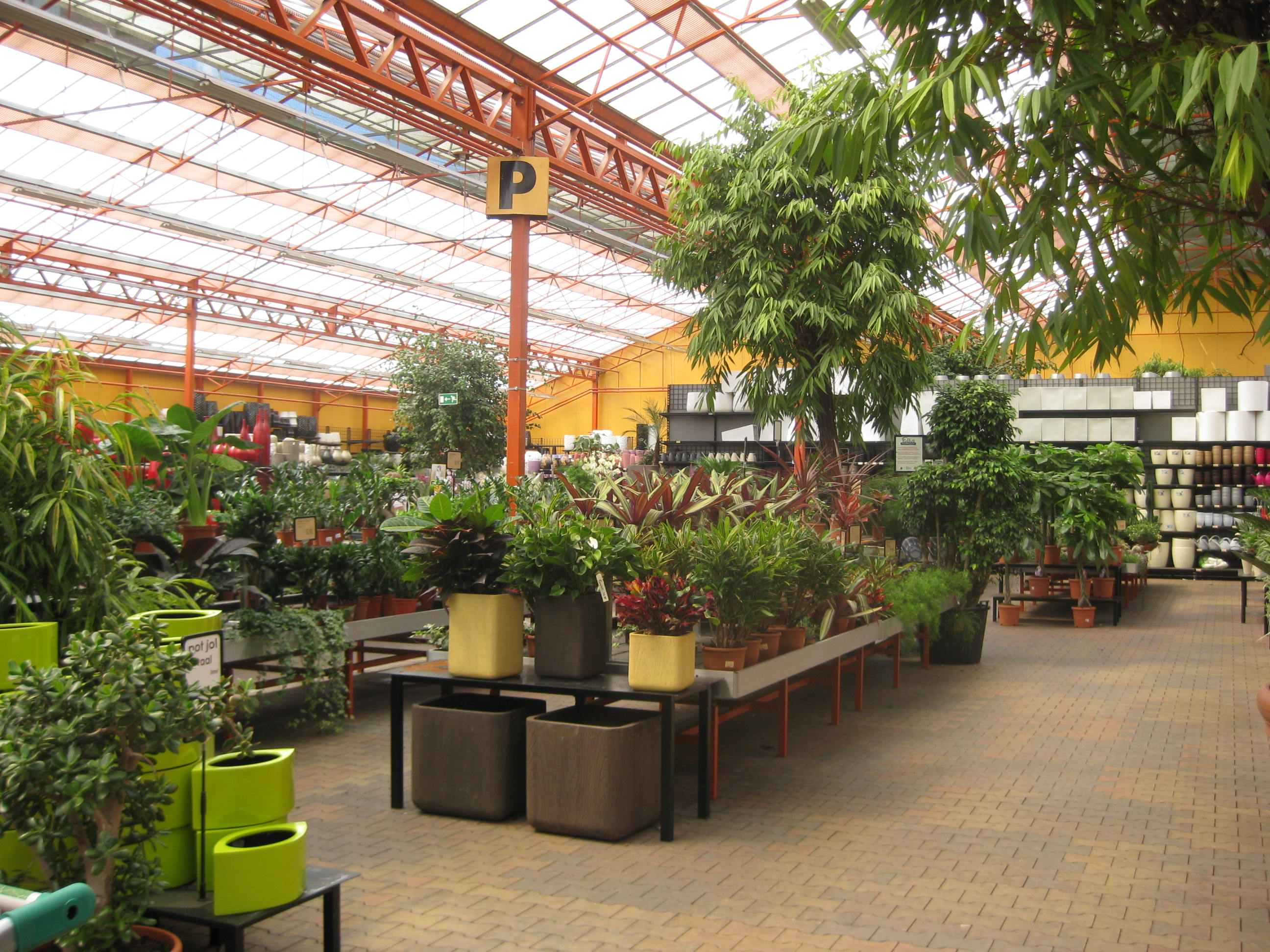 Tuincentrum in Amsterdam